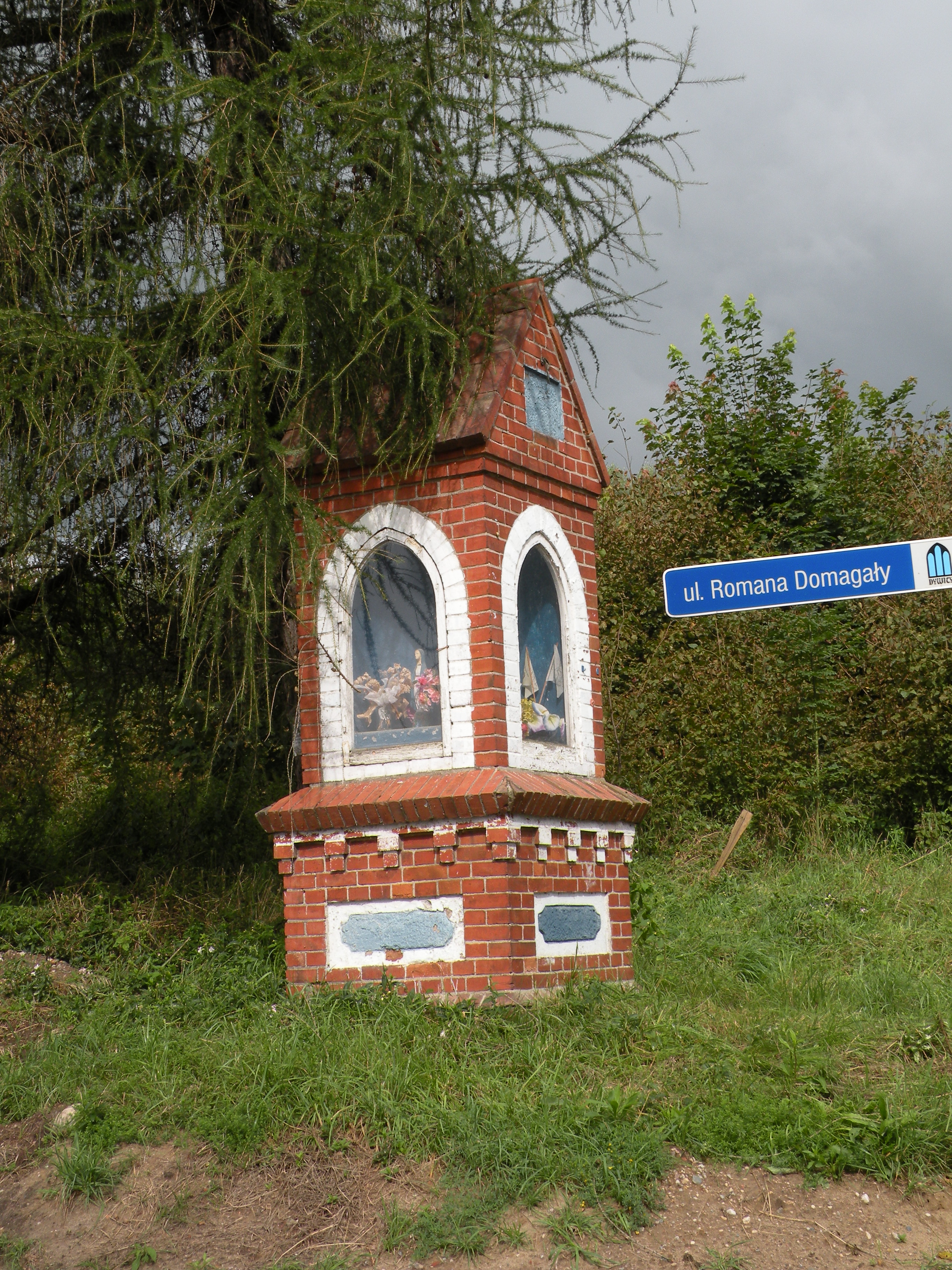 Słupy